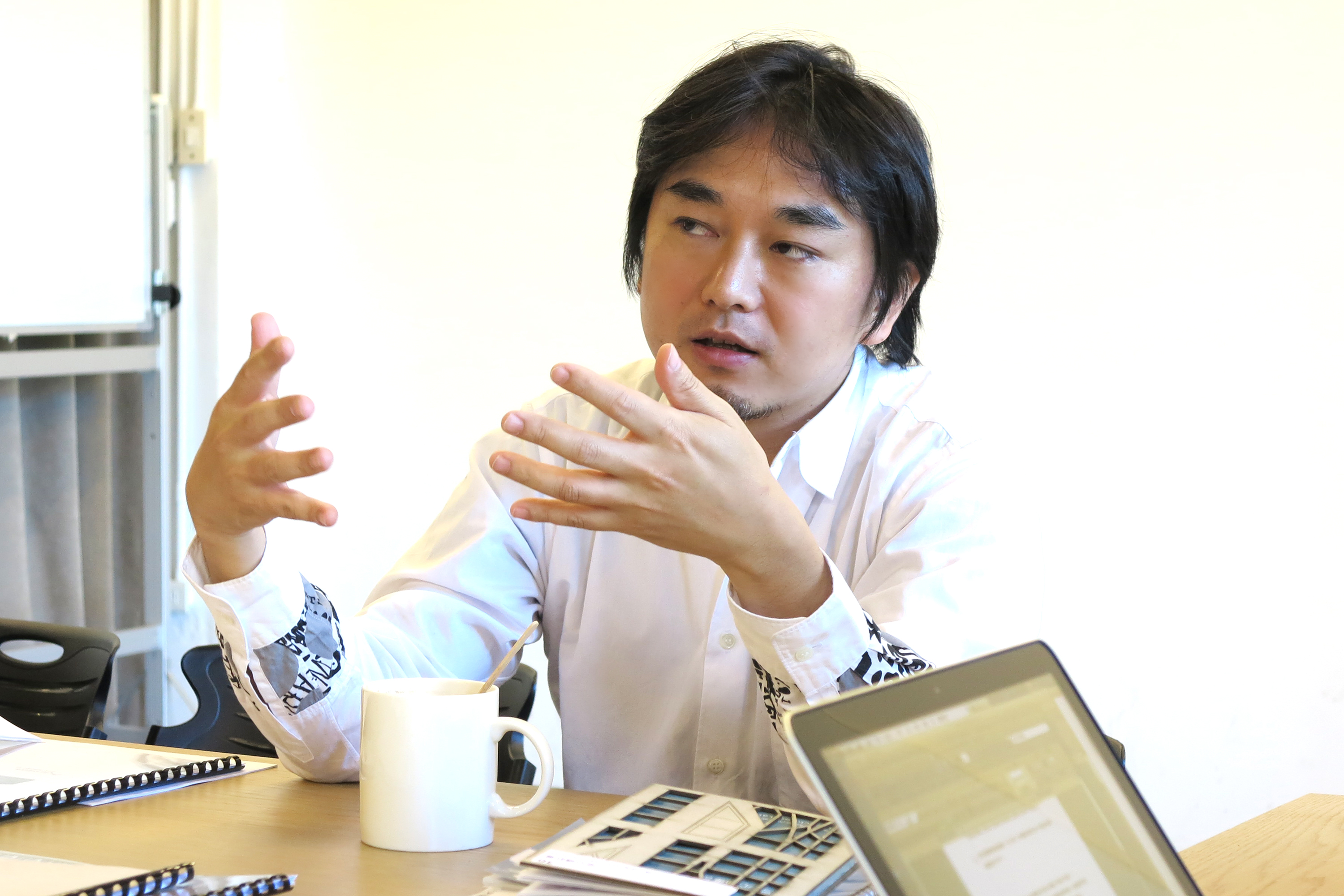 日本建築師平田晃久。